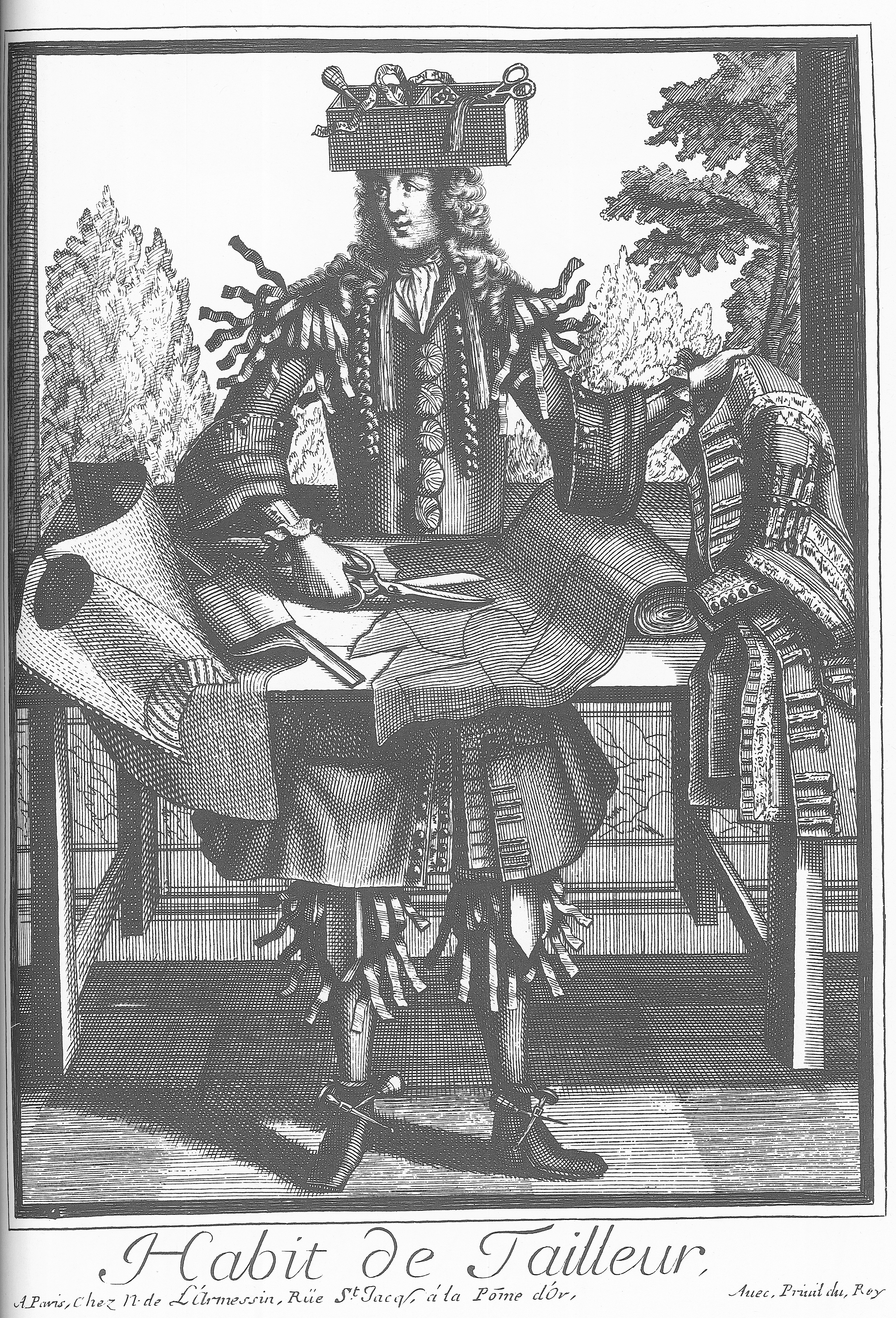 Gravure attribuée à Nicolas II de Larmessin, réalisée probablement au XVIIe siècle.